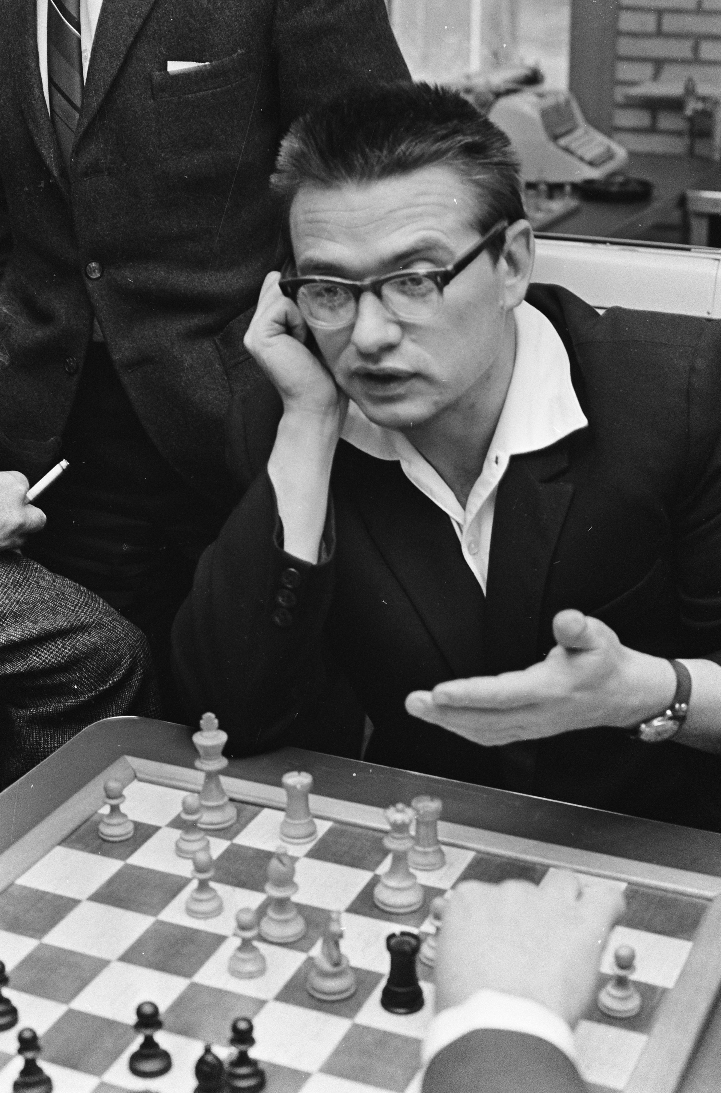 Collectie / Archief : Fotocollectie Anefo Reportage / Serie : [ onbekend ] Beschrijving : Hoogovenschaaktoernooi, de Rus Loutikov werd tweede Datum : 28 januari 1967 Trefwoorden : schaken Instellingsnaam : Hoogovenschaaktoernooi Fotograaf : Nijs, Jac. de / Anefo Auteursrechthebbende : Nationaal Archief Materiaalsoort : Negatief (zwart/wit) Nummer archiefinventaris : bekijk toegang 2.24.01.05 Bestanddeelnummer : 920-0214